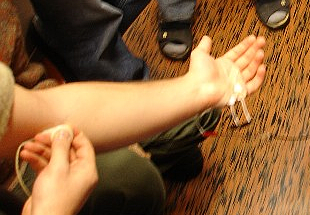 Messung der Nervenleitgeschwindigkeit / Measuring nerve transmission speed